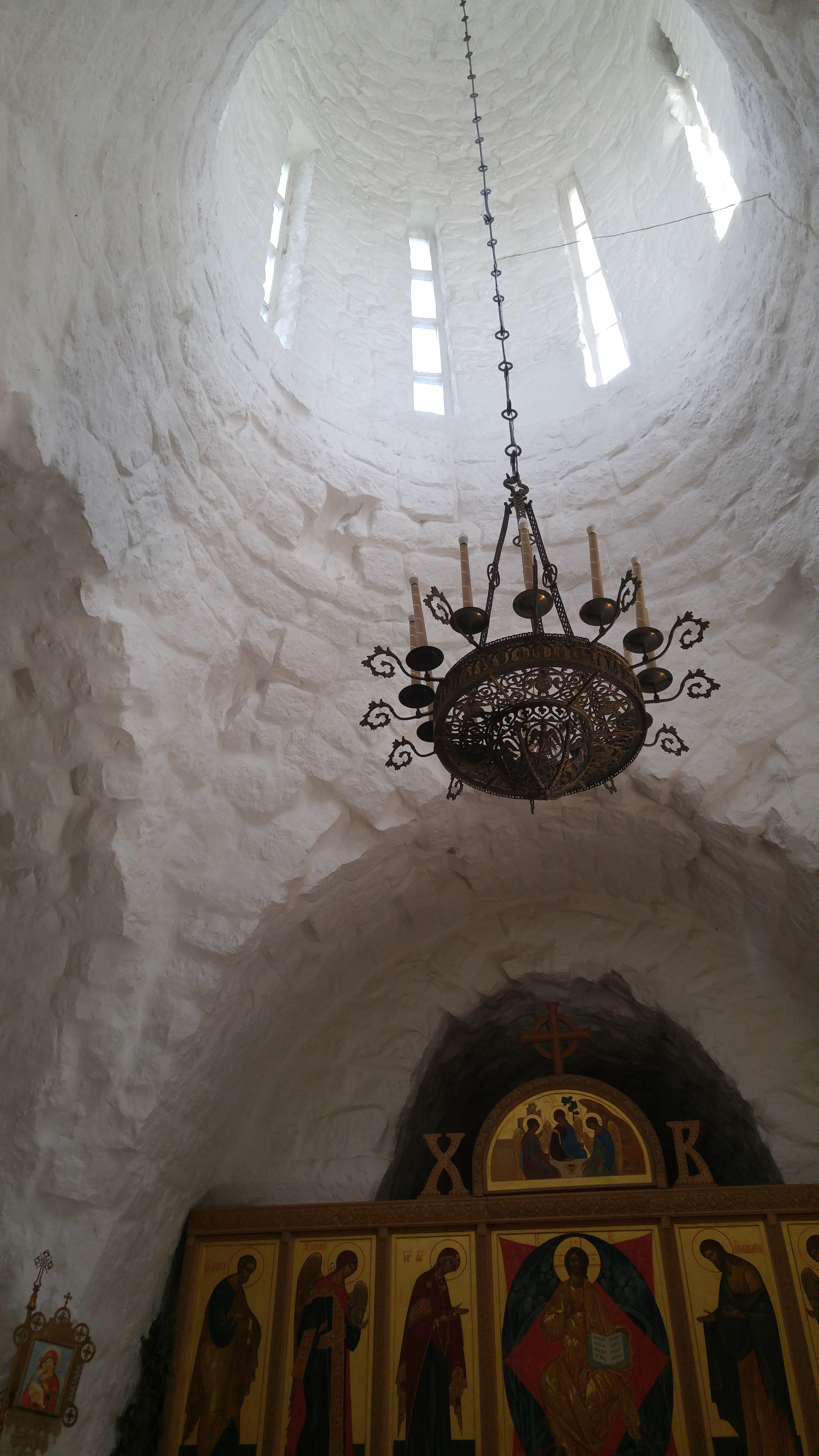 Своды и барабан церкви Святого Николая в Каменском